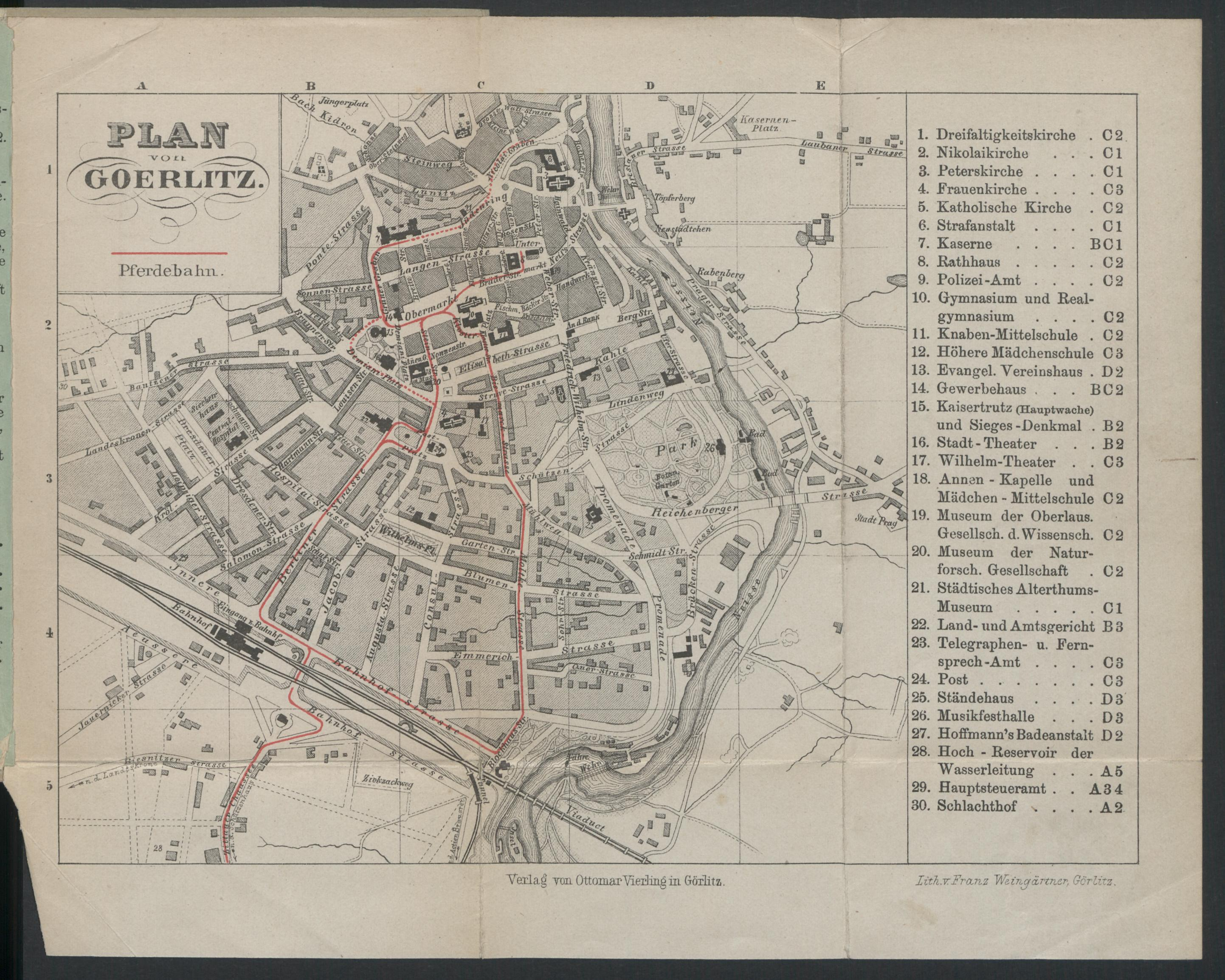 Übersichtsplan der Görlitzer Pferdebahn